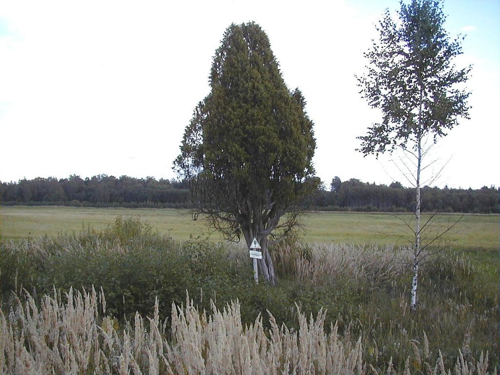 Auziņu paeglis Praulienas pagastā. 2001-08-25